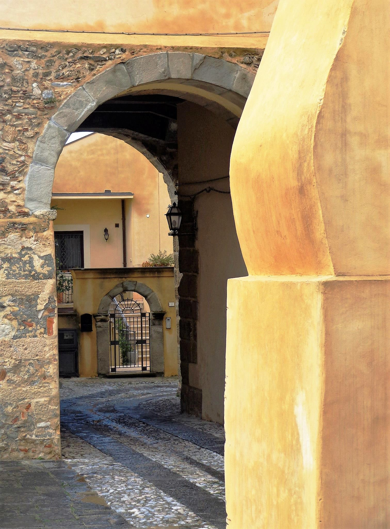 Sottopassaggio transetto - absidi duomo. Foto d'archivio. Immagine già presente su Facebook, Panoramio e altre pagine personali.